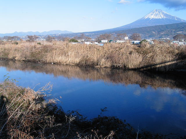 静岡県富士市の浮島ヶ原を流れる沼川